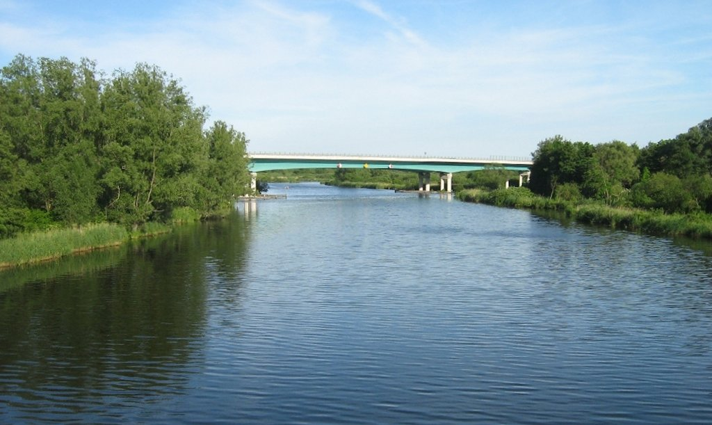 Die 1.100 m lange Brücke der Bundesautobahn A20 über dem Tal der Peene bei Jarmen (Mecklenburg-Vorpommern.)